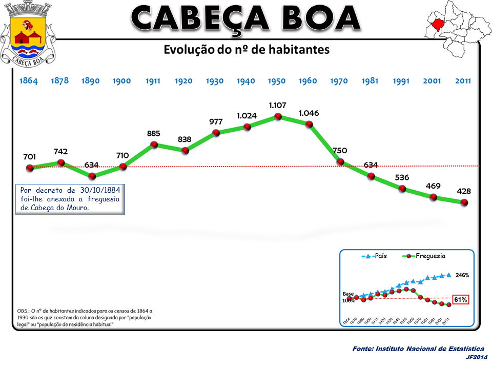 Evolução da População 1864 / 2011